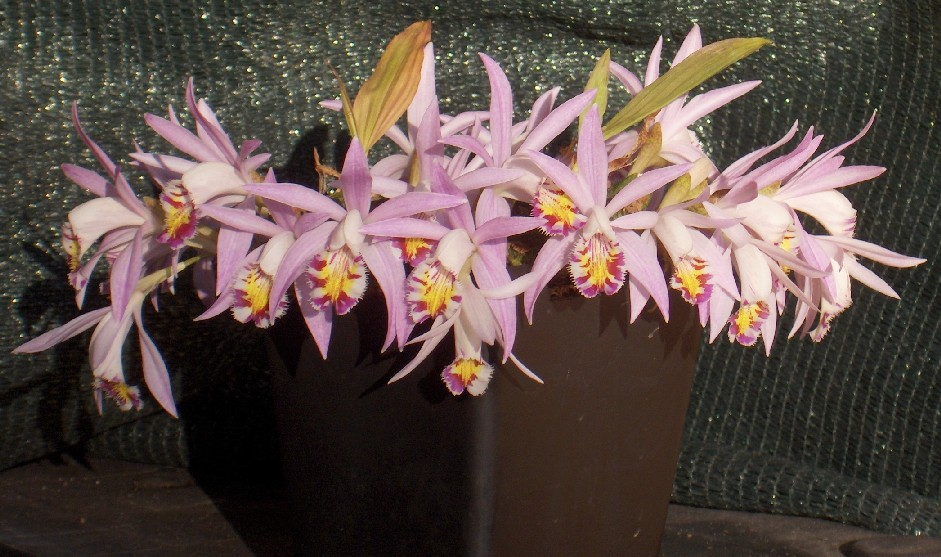 Pleione Confirmation - (Pleione × lagenaria, ottenuta artificialmente da Jan Berg) - foto di Iacopo Lazzareschi Cervelli concessa dall'autore